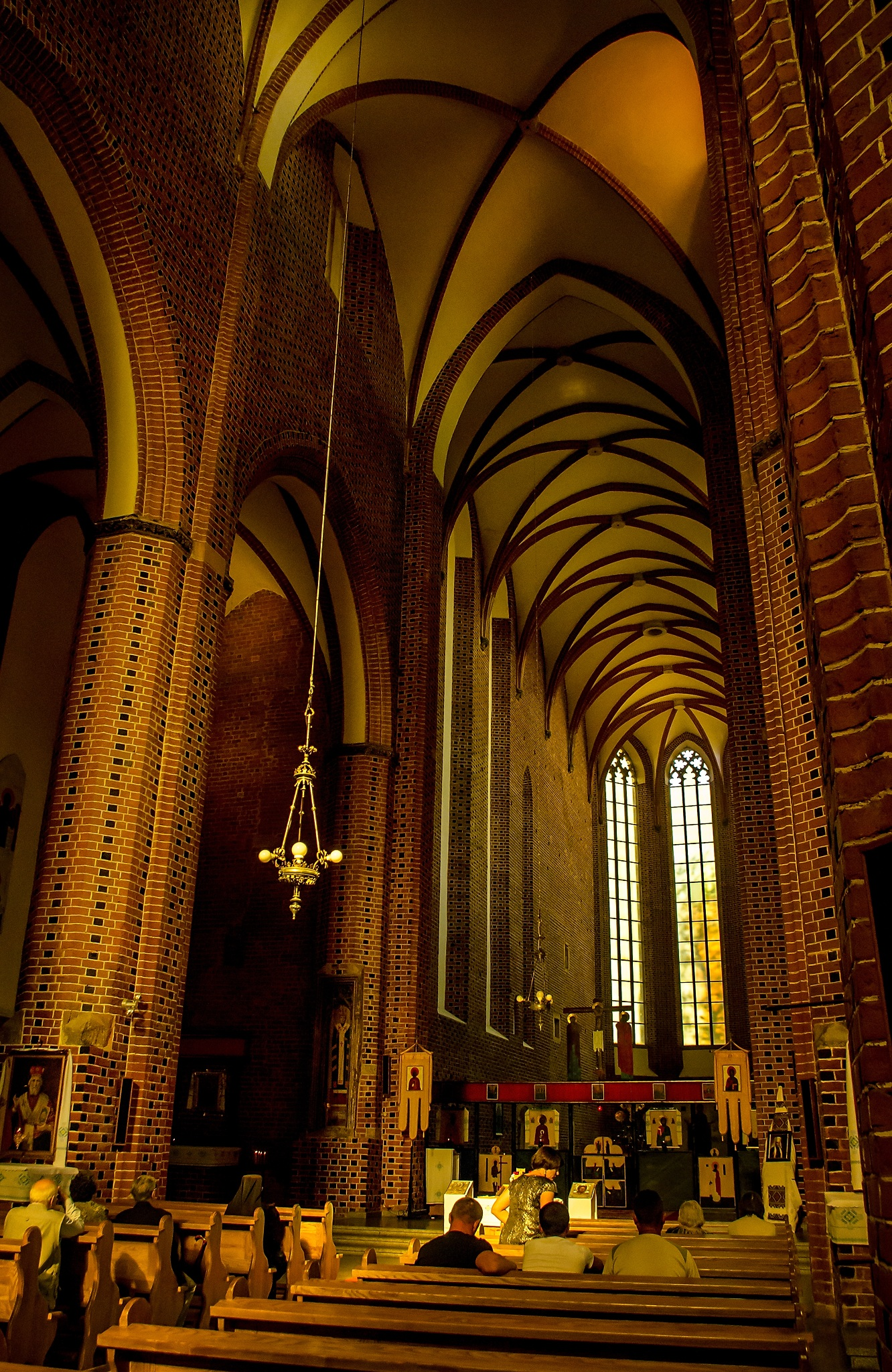 Wrocław Stare Miasto, pl. Nankiera 15 - dawny kościół św. Jakuba i Wincentego, obecnie katedra obrządku greckokatolickiego wraz z kaplicą Mariacką (Hochberga)